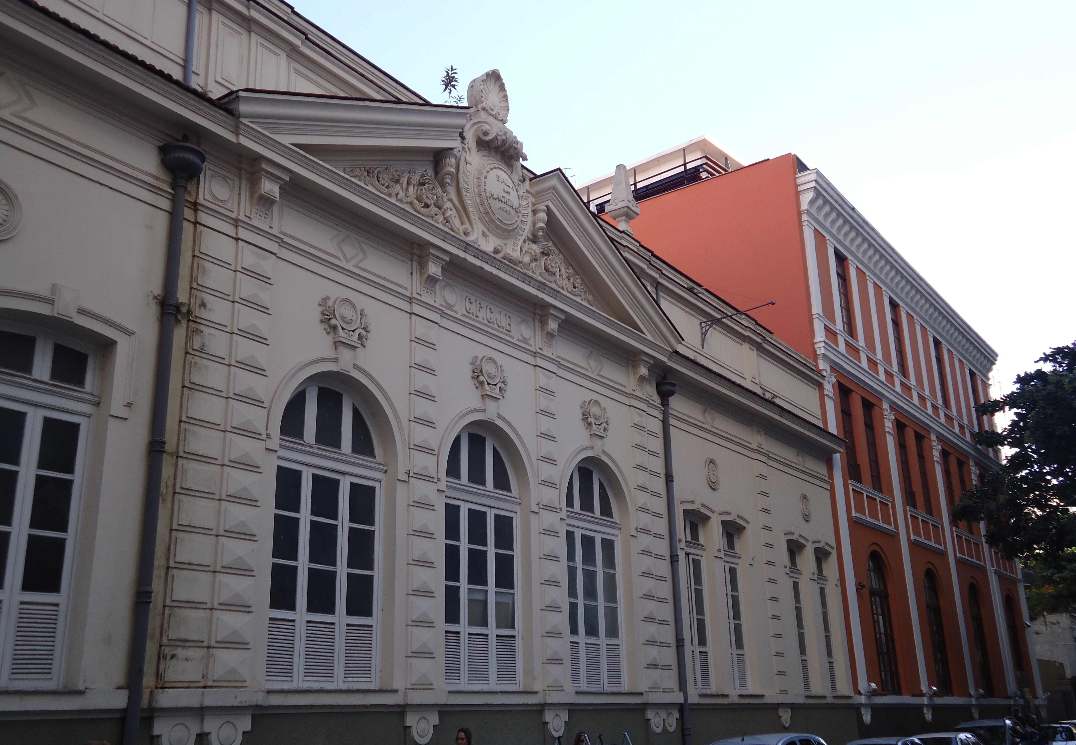 Prédio da Sala das Máquinas da Companhia Ferro-Carril do Jardim Botânico (1904), visto da Rua 2 de Dezembro, no bairro do Flamengo, cidade e município do Rio de Janeiro, estado do Rio de Janeiro, Brasil.